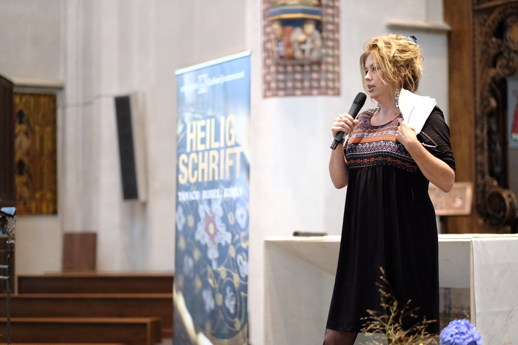 Museum Catharijneconvent - opening tentoonstelling Heilig Schrift